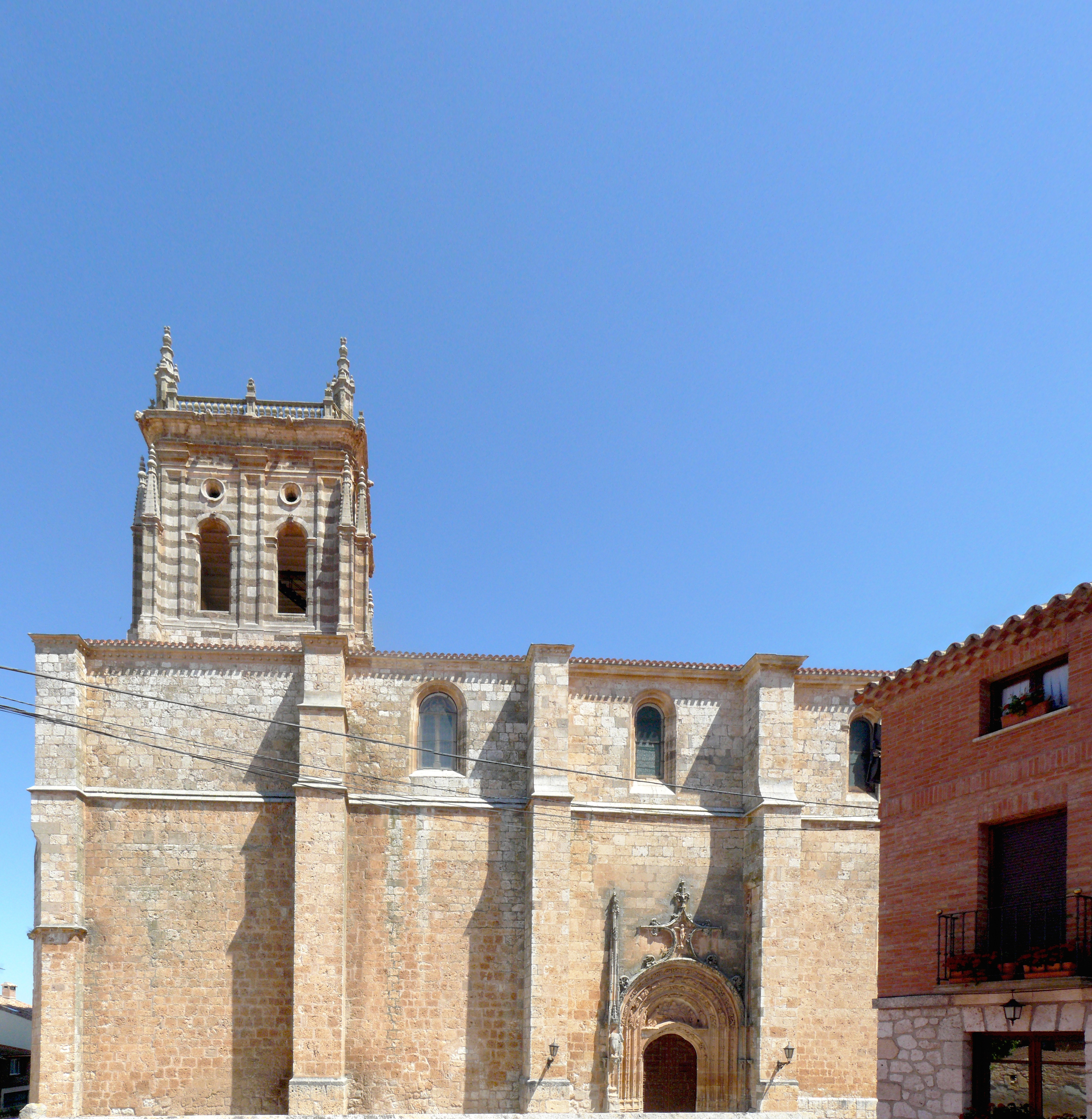 Iglesia de la Asunción de NUesrta Señora, Villahoz, Burgos.